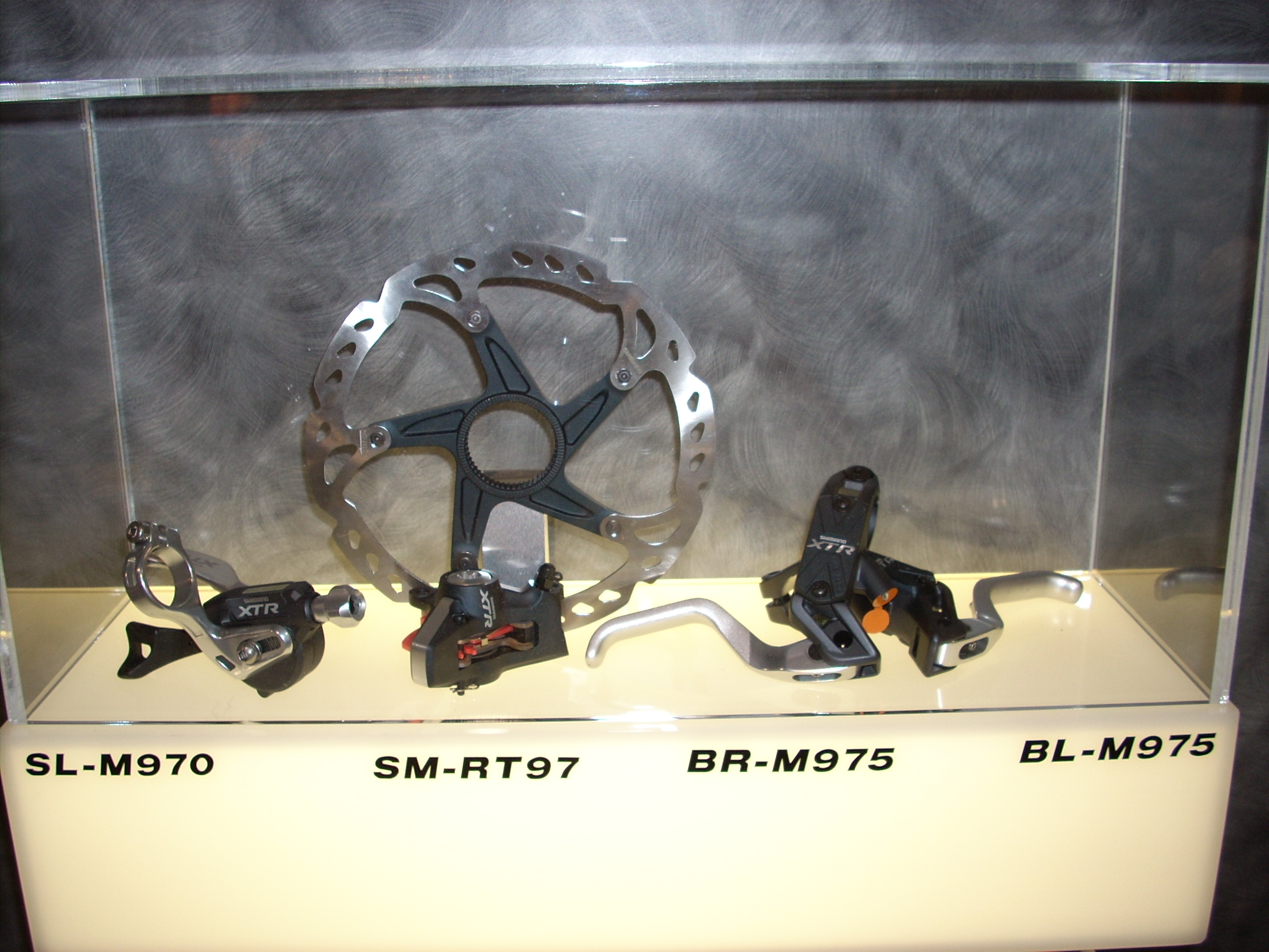 Shimano XTR 970 disk brakes